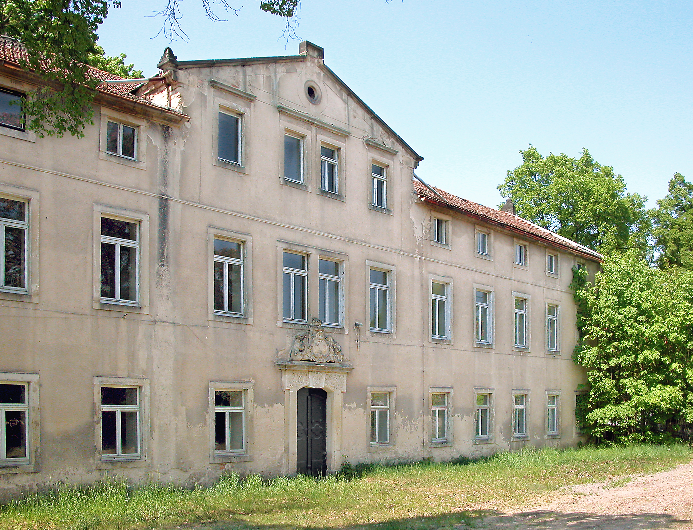 04.05.2007 01561 Dallwitz (Priestewitz), Schloßweg 1 (GMP: 51.246914,13.553685): Nach sieben Jahren Festungshaft auf dem Königstein ließ sich der einstige Großkanzler und Berater Augusts des Starken, Wolf Dietrich Graf von Beichlingen, 1710 das barocke Schloß in Dallwitz errichten. Der Schlußstein mit der Jahreszahl 1710 im Portal zum Park verweist darauf. Das hofseitige Eingangsportal erhielt um 1750 eine Sandsteinbekrönung mit den Wappen des Johann Georg Schmidt von Altenstadt und der Margareta Klara Sichart von Sichartshof. Gegen Ende des 19. Jahrhunderts erhielt das Haus ein drittes Geschoß. Mit dem Bau des Truppenübungsplatzes Königsbrück ging das Rittergut 1901 an das Kriegsministerium. 1991 wurde das Anwesen privatisiert. Das Schloß steht leer. Ansicht Hofseite (Osten). [DSCN27789.TIF]20070504140DR.JPG(c)Blobelt